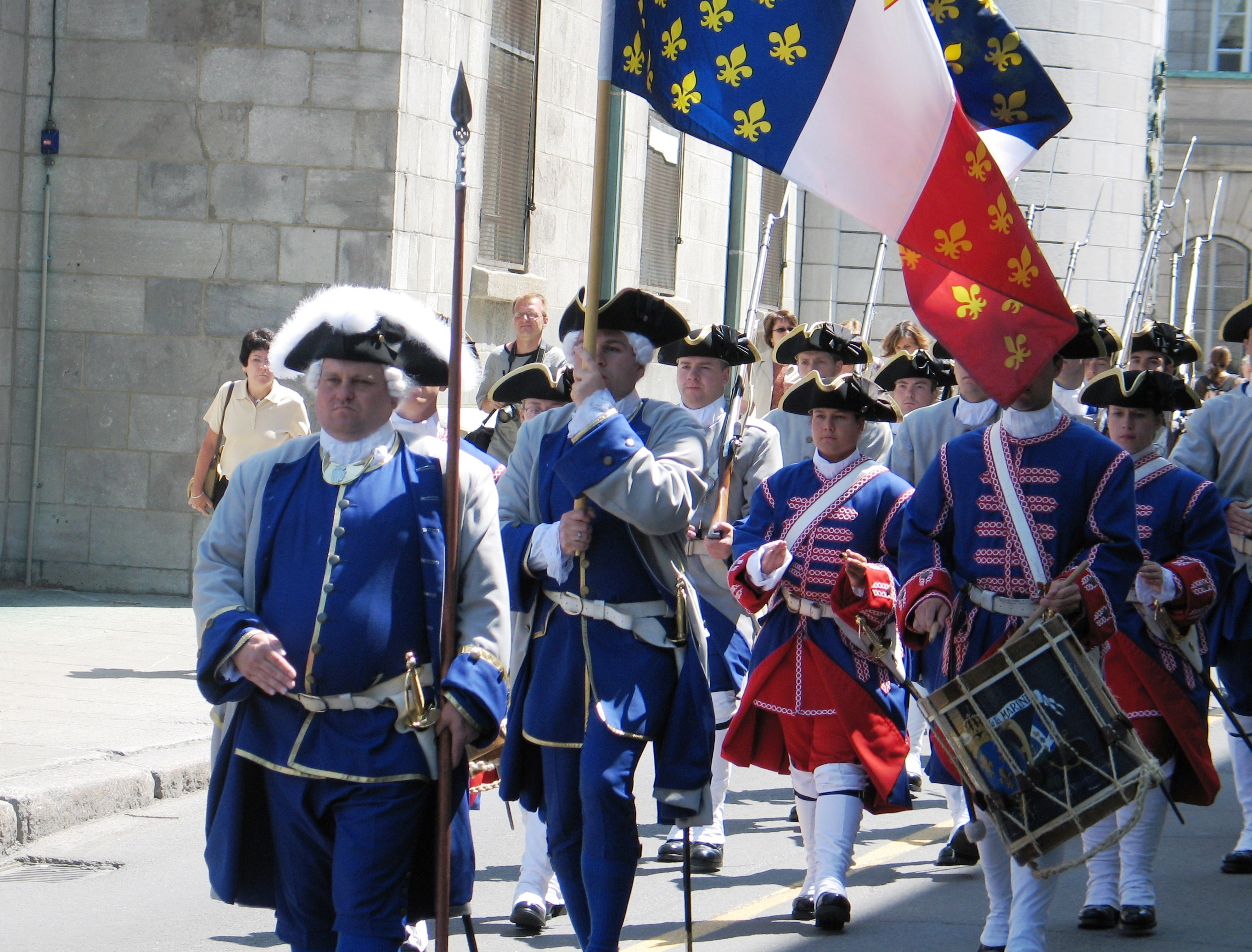 La compagnie franche de la marine exerce son droit de cité dans la vieille ville fortifiée de Québec, à l'occasion du 398e anniversaire de la ville, le 3 juillet 2006. (Photo Claude Boucher)